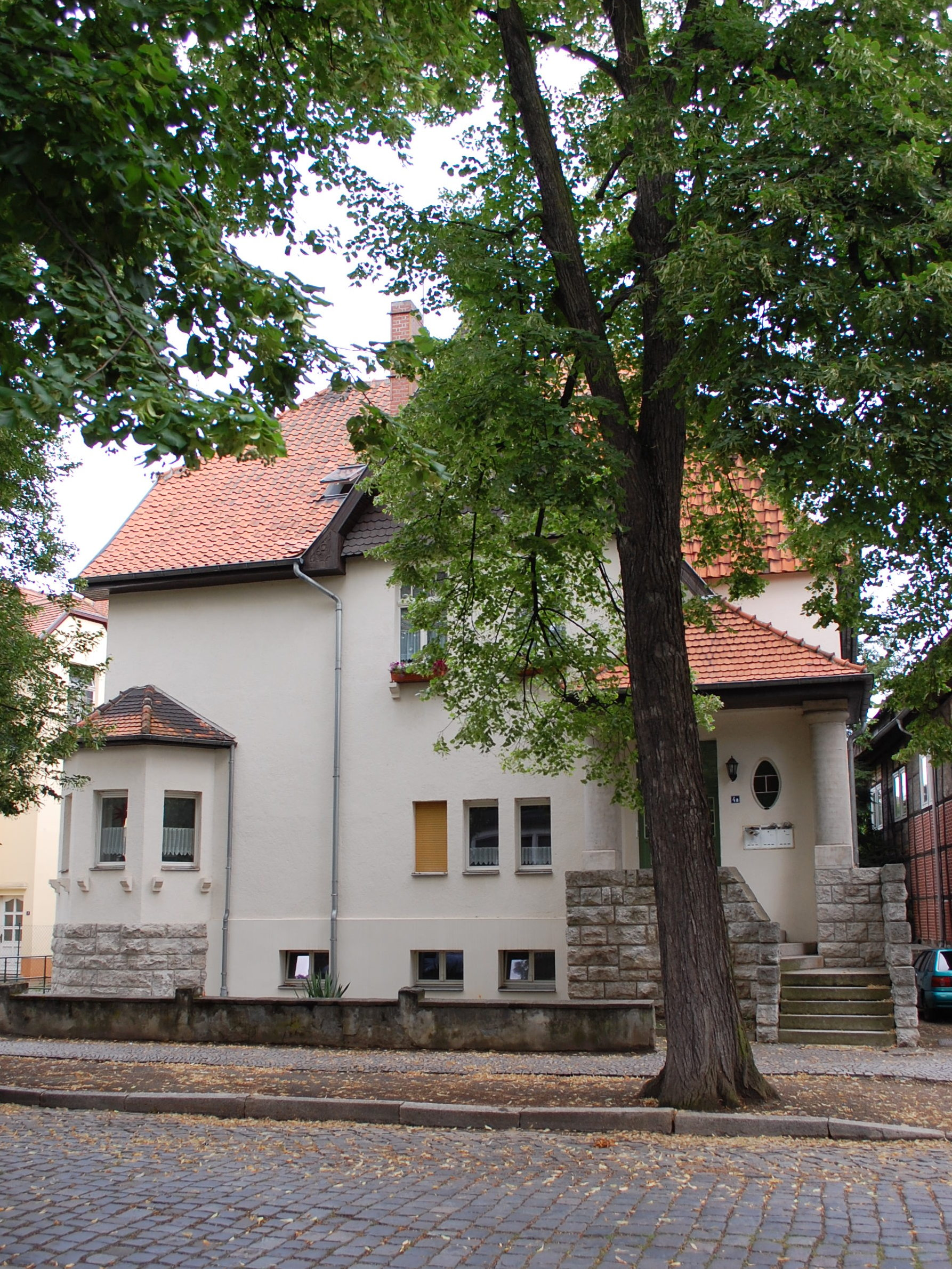 Haus Am Schiff Bleek 4a in Quedlinburg